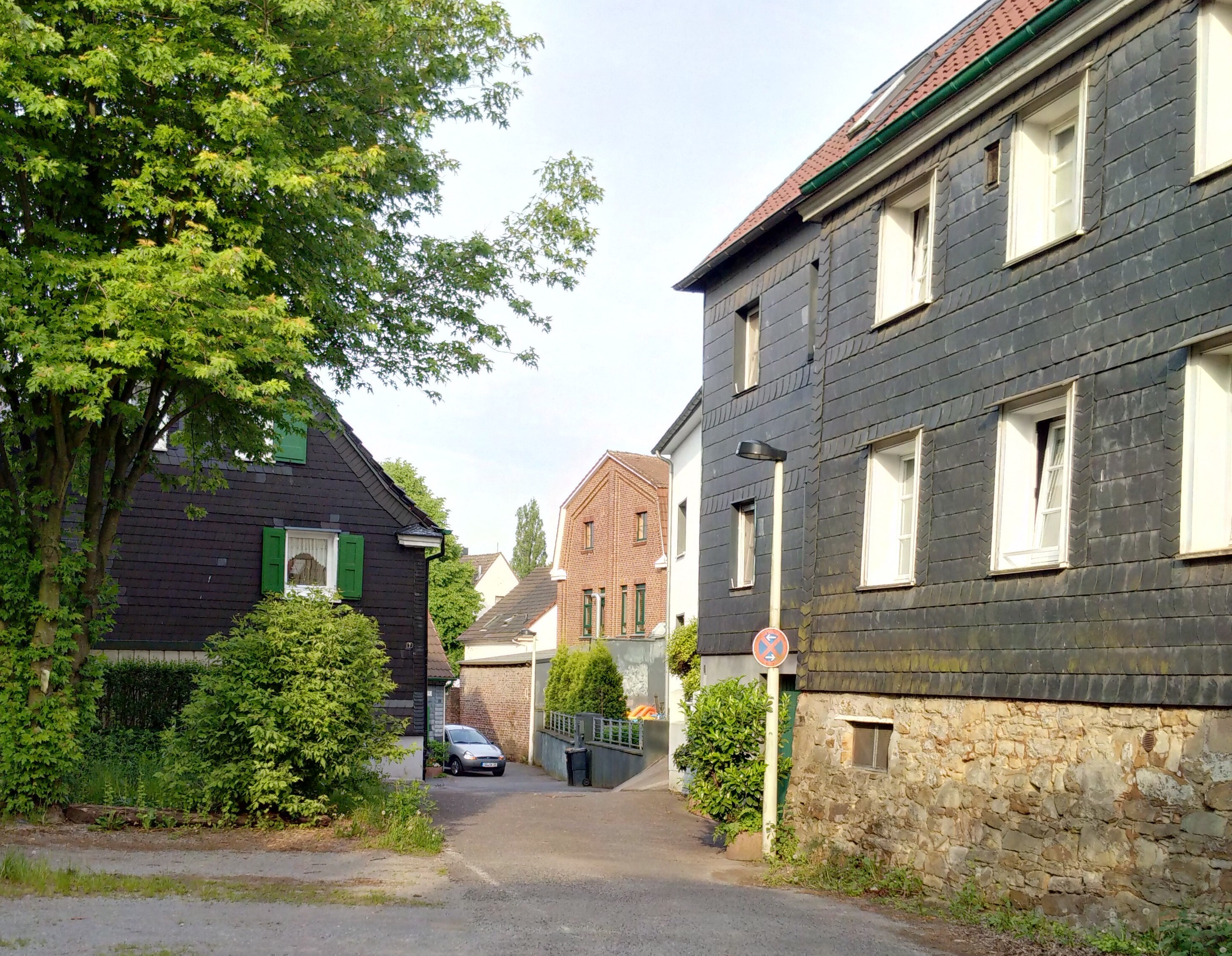 Wohnhäuser im I. Stockdum in Solingen, aufgenommen im Frühling 2016